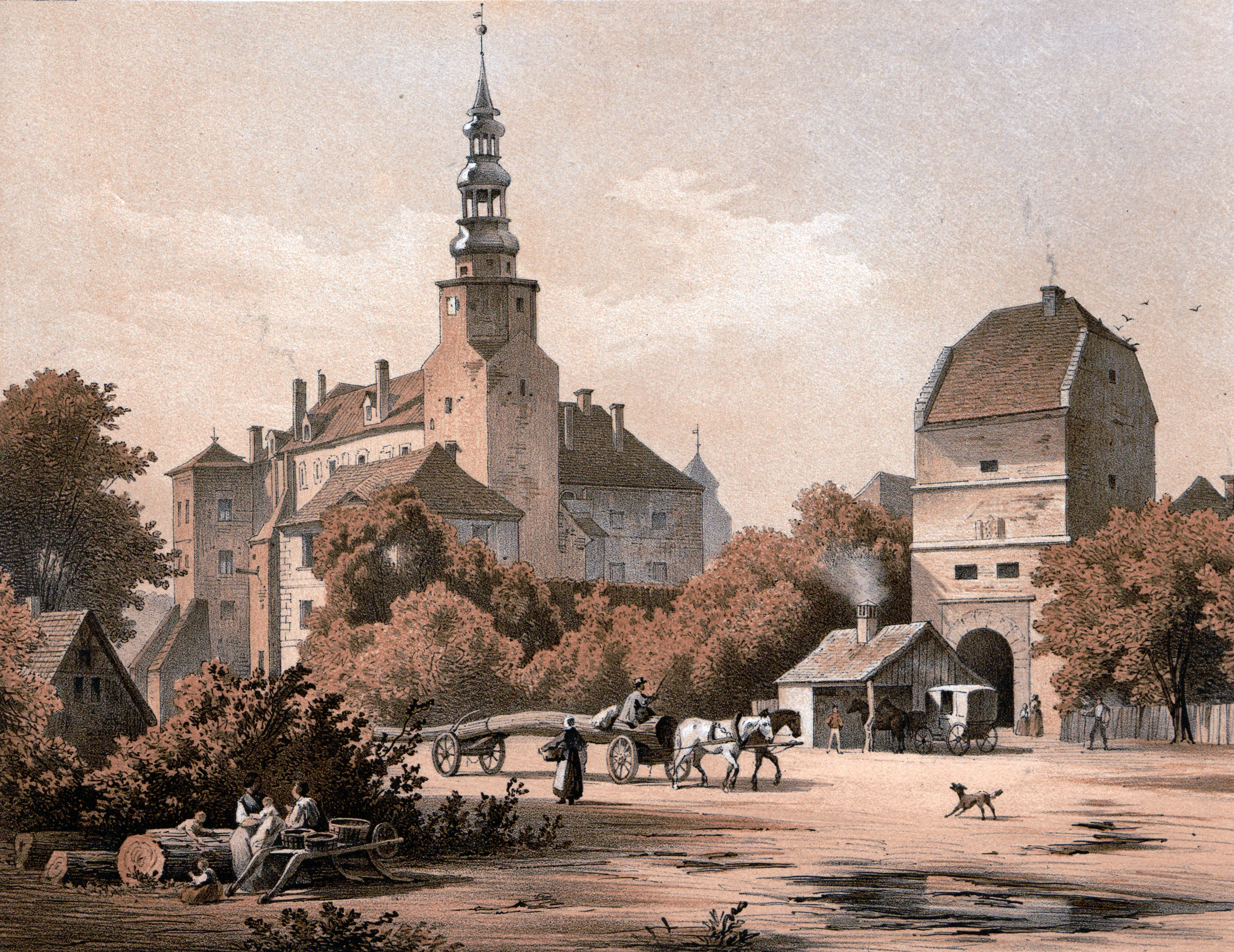 Schloss in Bernstadt, Niederschlesien, Kreis Oels